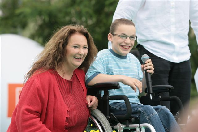 Festiwal Zaczarowanej Piosenki - Anna Dymna z jednym z finalistów koncertu finałowego